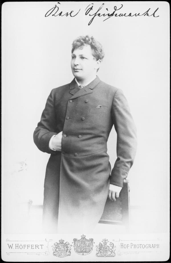 Karl Scheidemantel as yong man